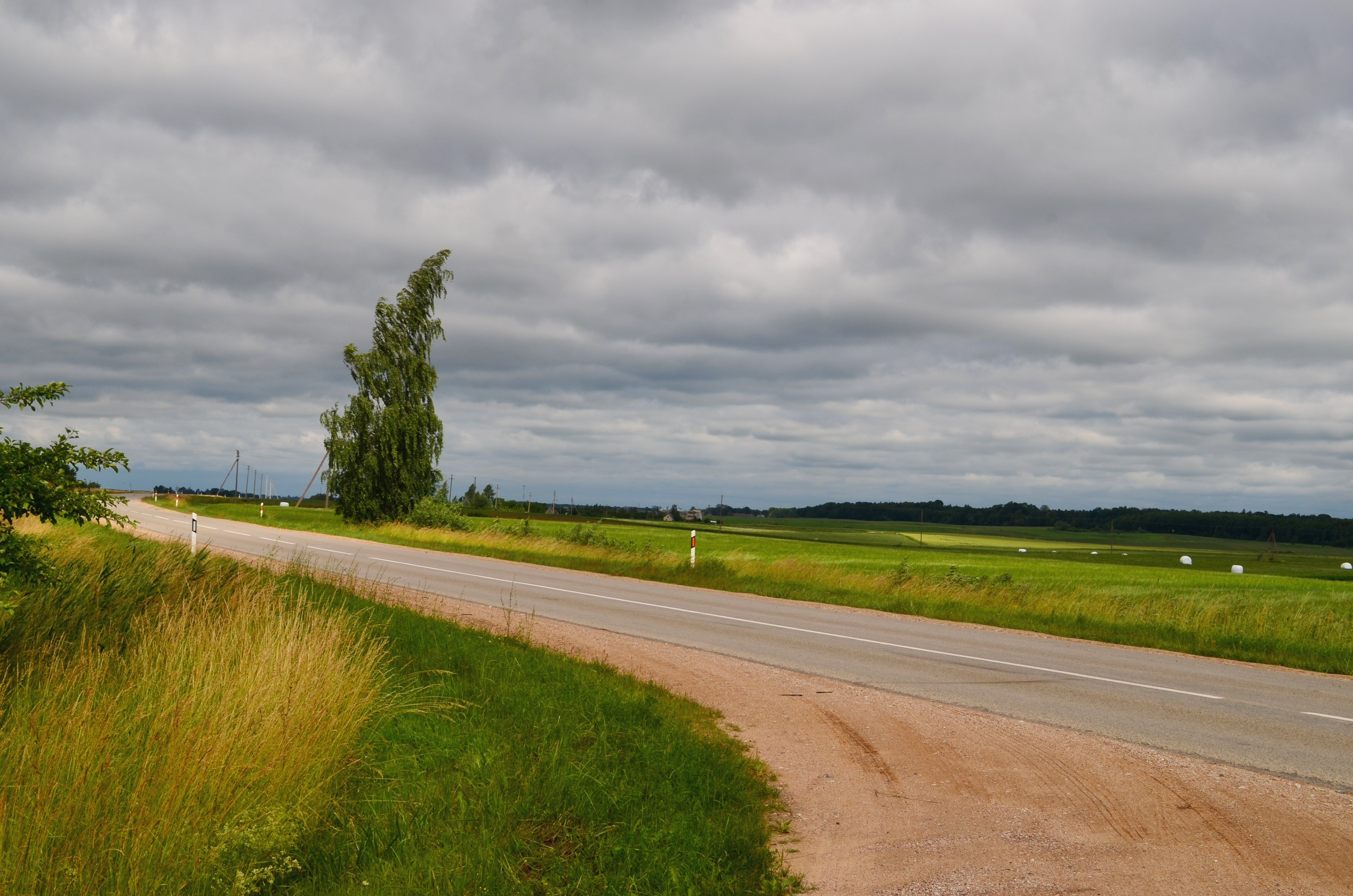 KK182 (Marijampolė-Krosna), Paželsviai, Marijampolės sav.